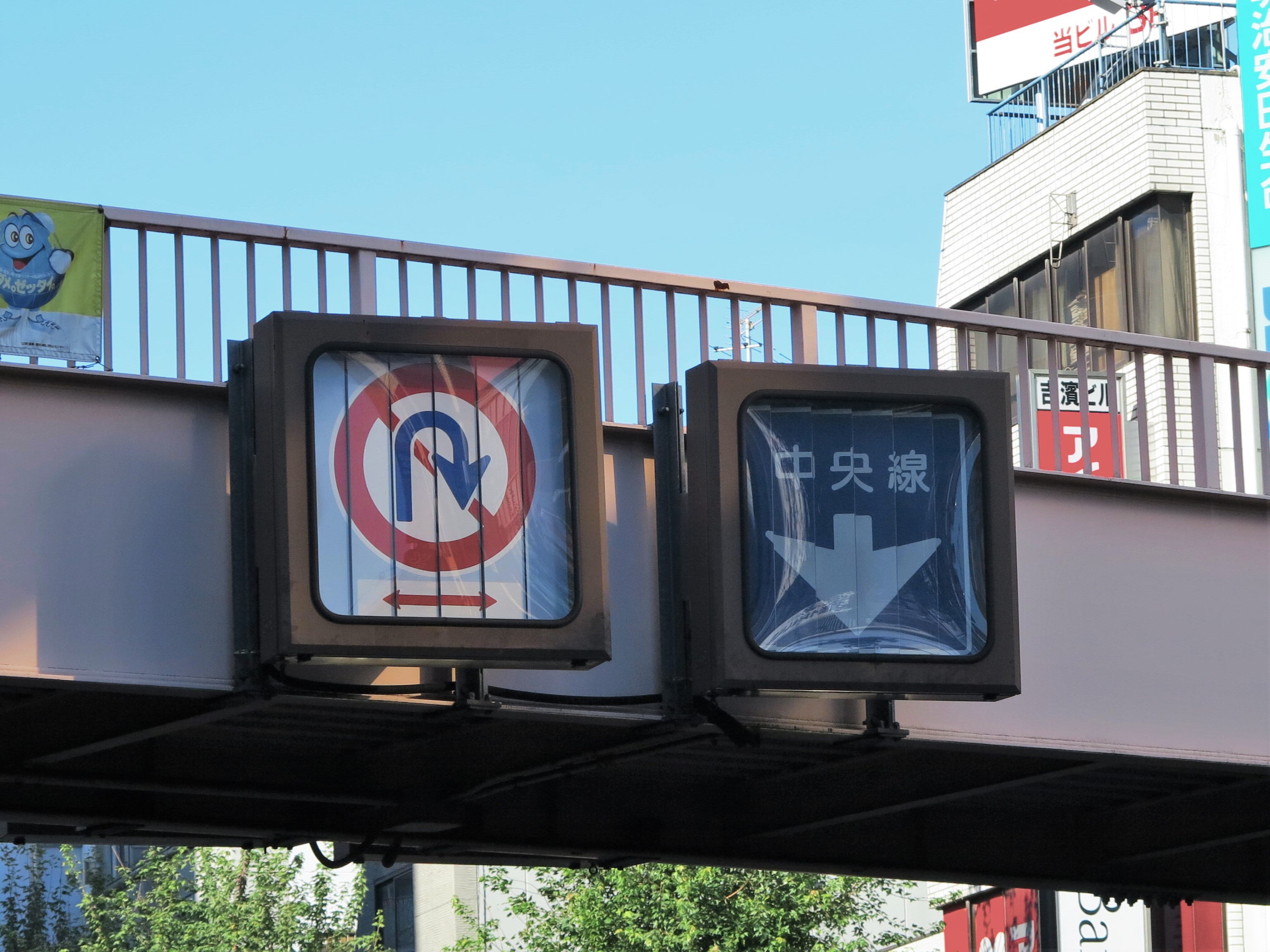 荻窪駅付近の青梅街道に設置されている可変式中央線標識